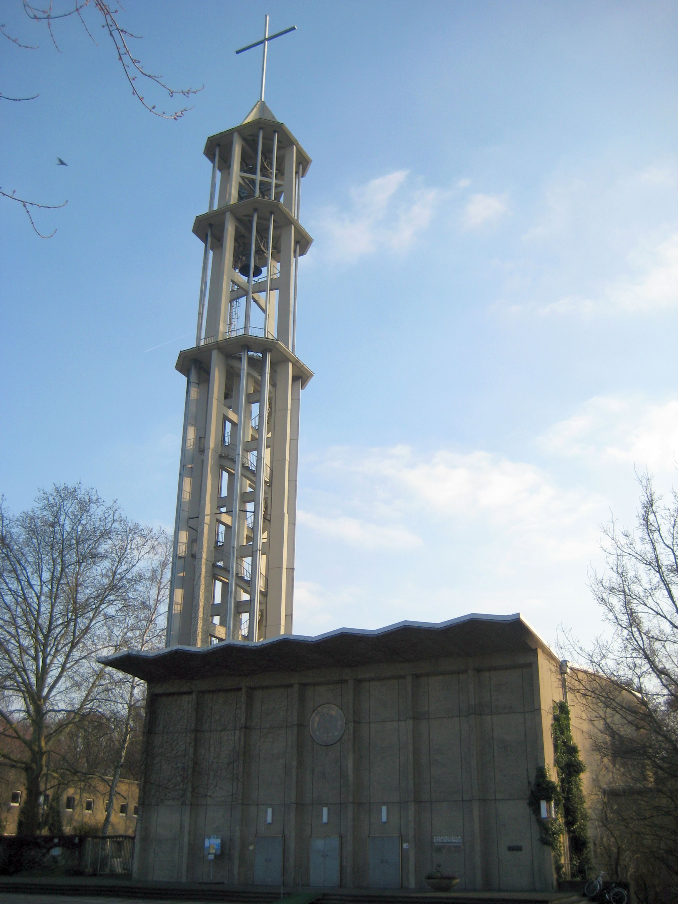 Emperor Friedrich Memorial Church (Kaiser-Friedrich-Gedächtniskirche) in Berlin, Hansaviertel by architect Ludwig Lemmer (1957)